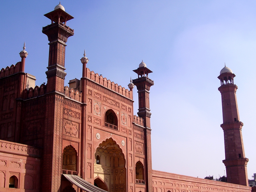 Badshahi Mosque Perspective